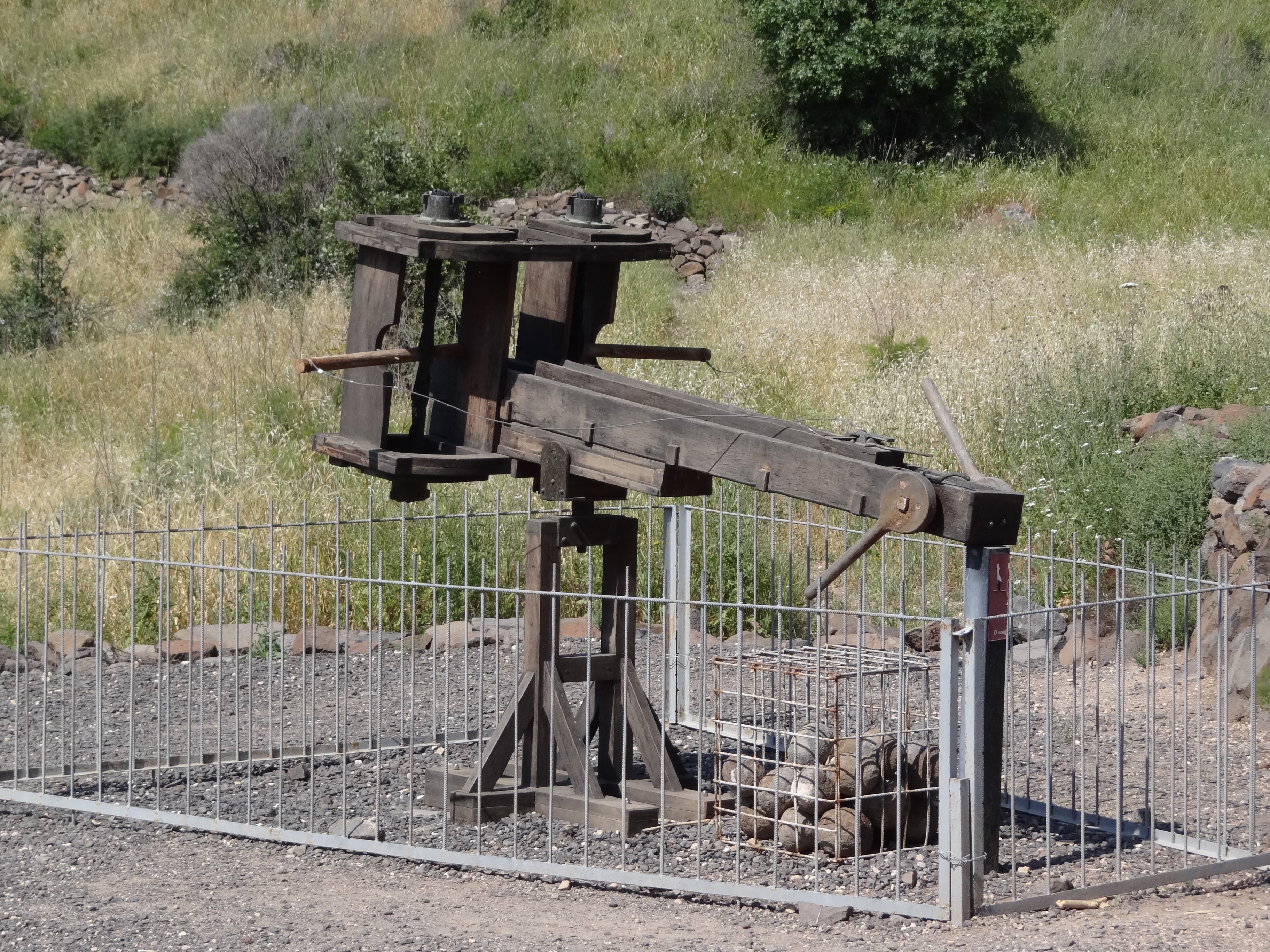 Gamla archaeology site אתר ארכאולוגי גמלא ברמת הגולן דגם בליסטרה רומי